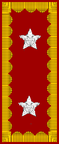 Presilla de General de Brigada del Ejercito de Chile